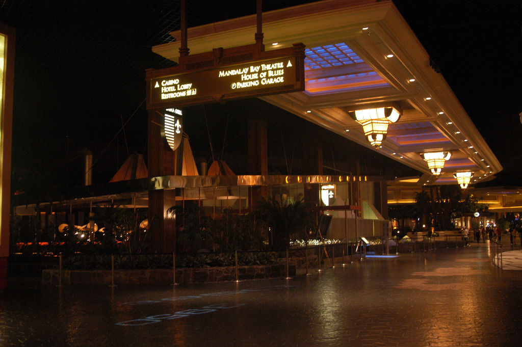 L'entrée du China Grill et une "artère" du Mandalay Bay. La photo est tirée de . L'adresse exacte où l'on peut trouver la photo est : L'auteur de cette photo est : adpowers